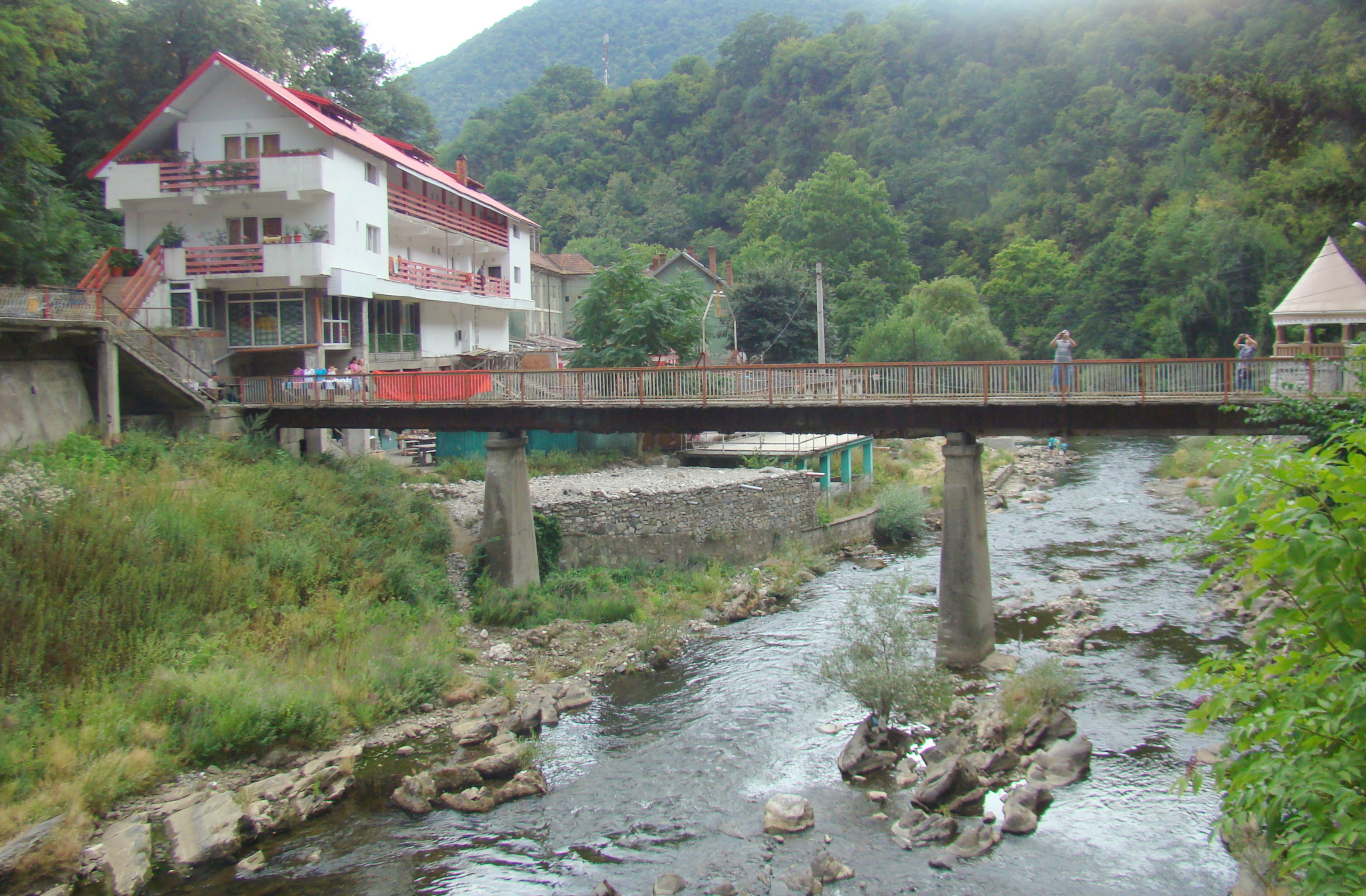 Podul Roșu, oraș Băile Herculane, între stăzile Castanilor și Zăvoiului, în dreptul Vilei Băncii